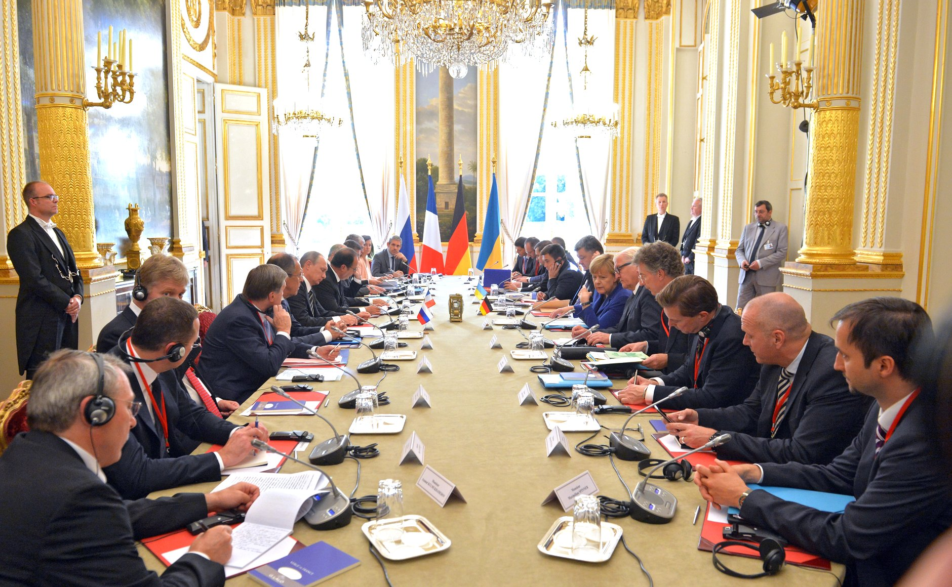 Переговоры в «нормандском формате» в расширенном составе